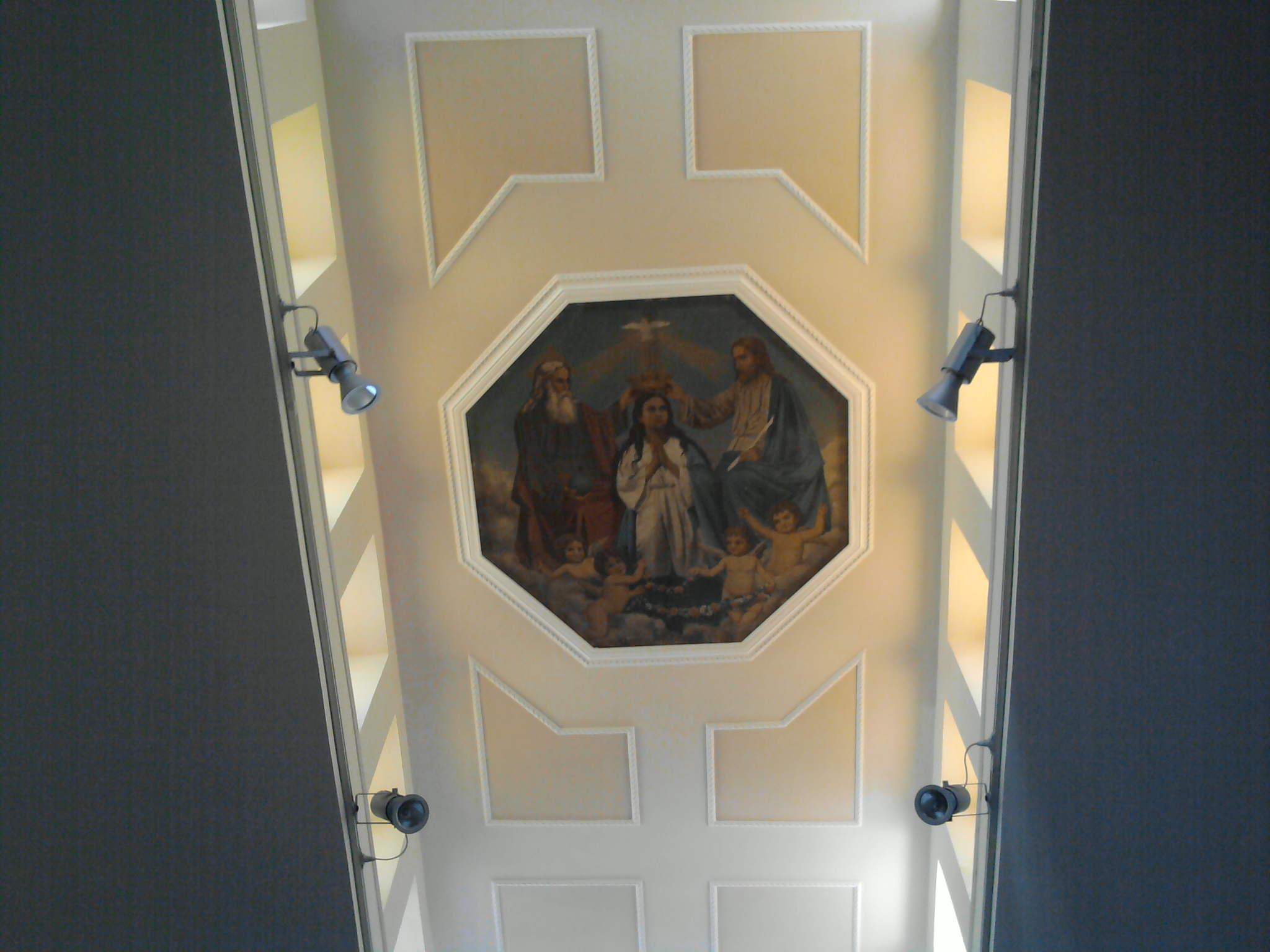 Soffitto della chiesa dell'Adorazione di Palmi